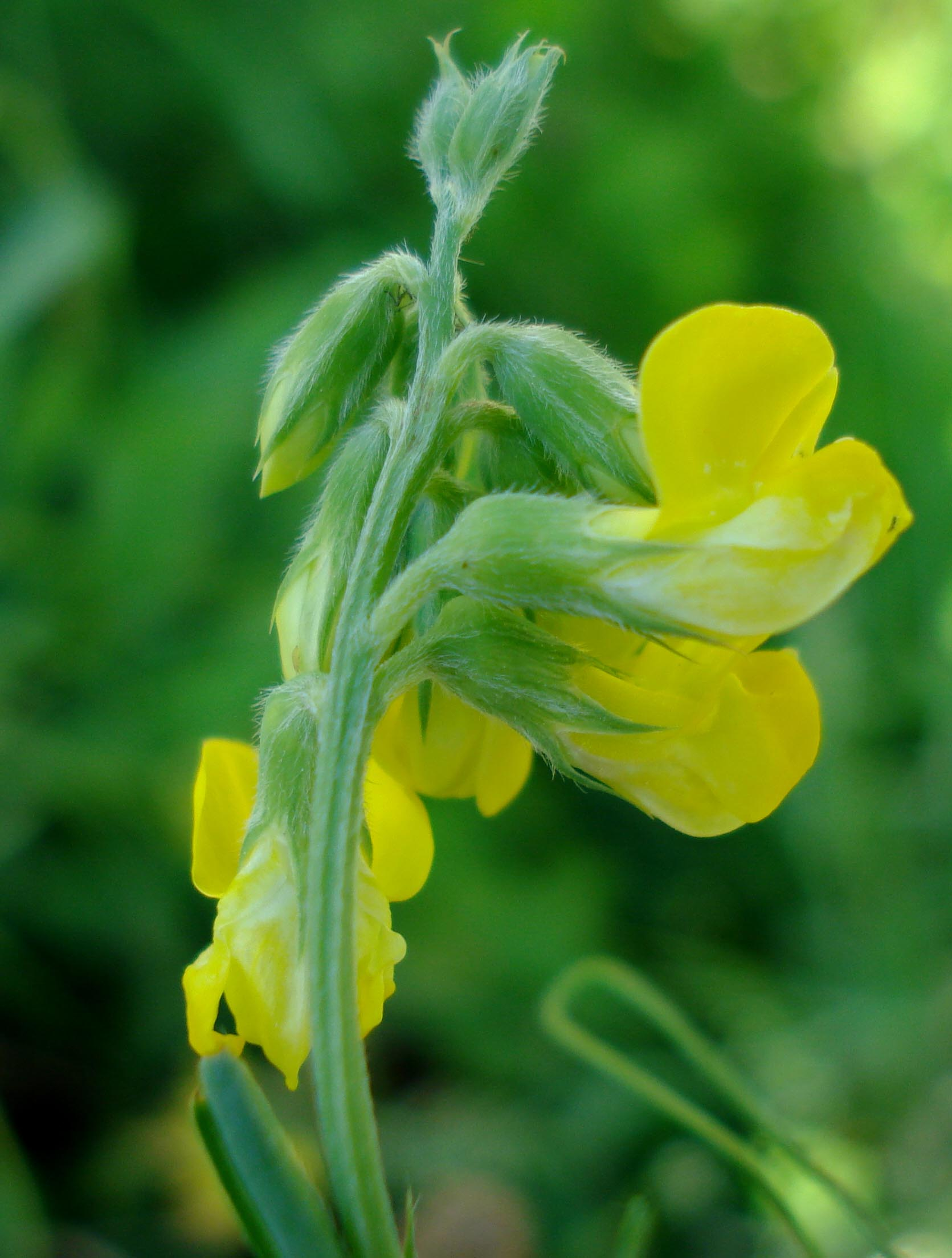 Lathyrus pratensis (Unterfranken, Germany)